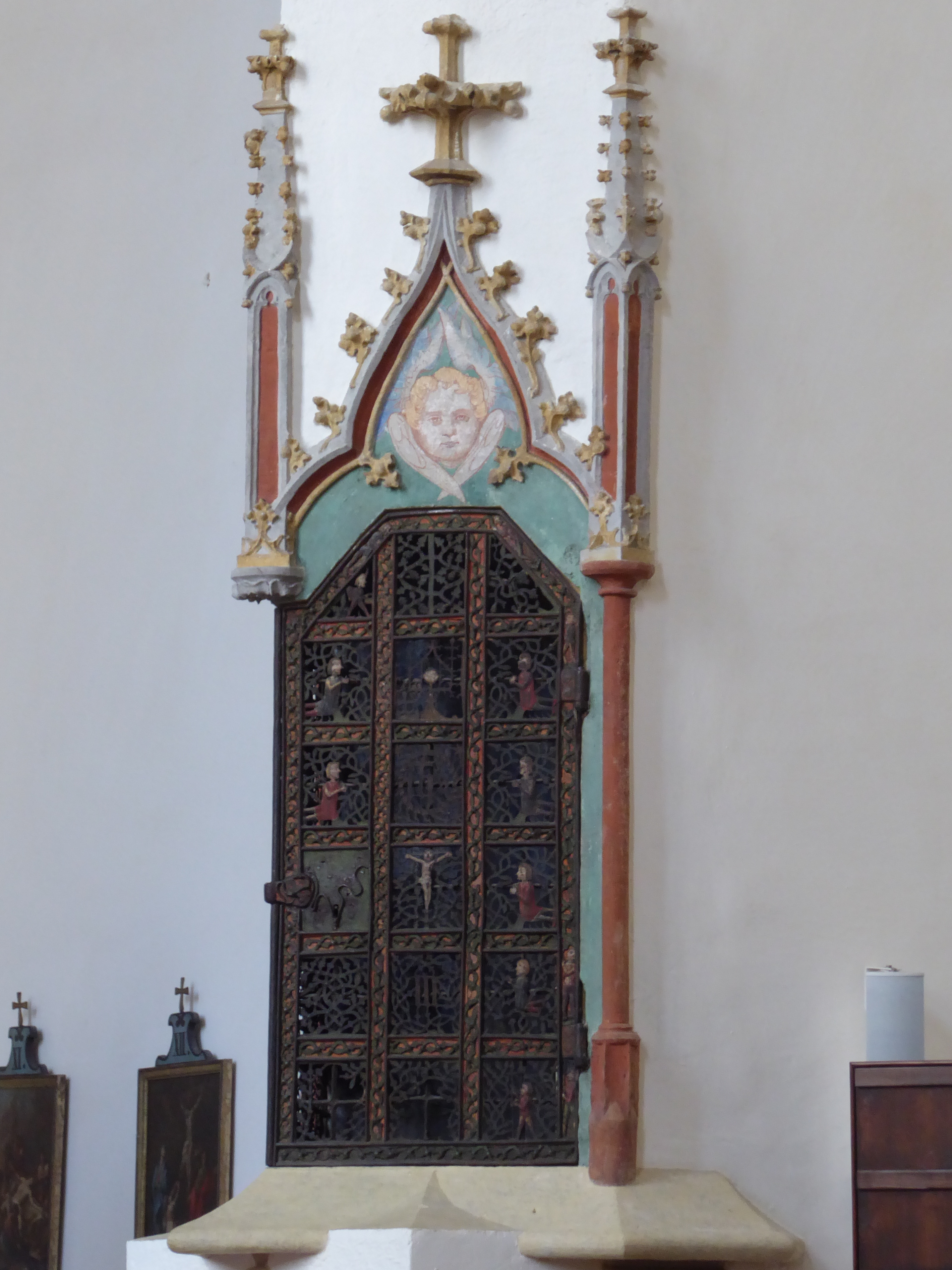 Bürgerspitalskirche hll. Philipp und Jakob, Obere Landstraße 5, Krems, Niederösterreich - Sakramentshäuschen im südöstlichen Wandpfeiler mit reich verzierten spätgotischen Schmiedeeisentürchen (ca. 1470)